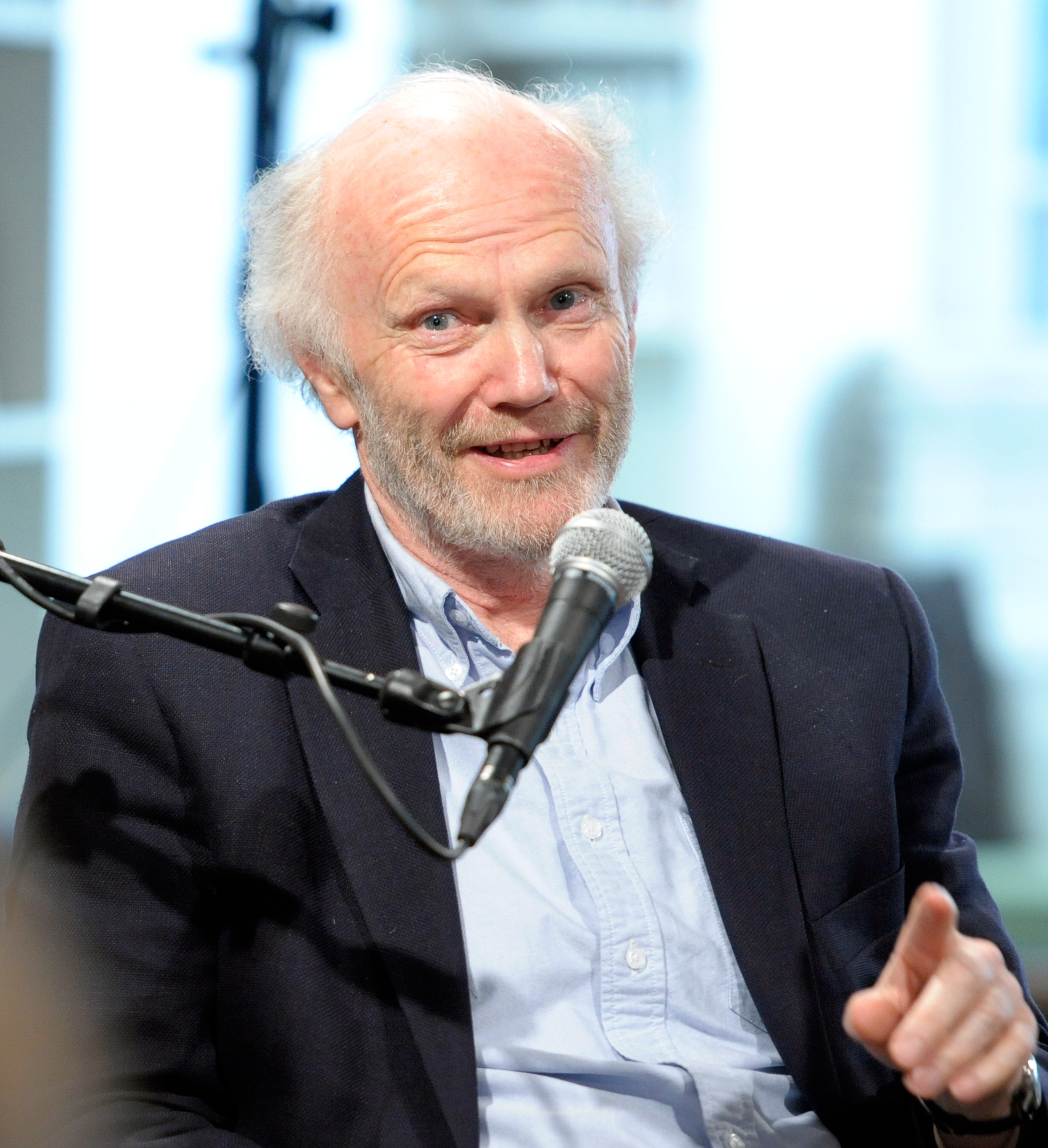 Geir Berdahl, förlagschef Oktober förlag, seminarium om Nordiska rådets litteraturpris Oslo 2011-04-11.